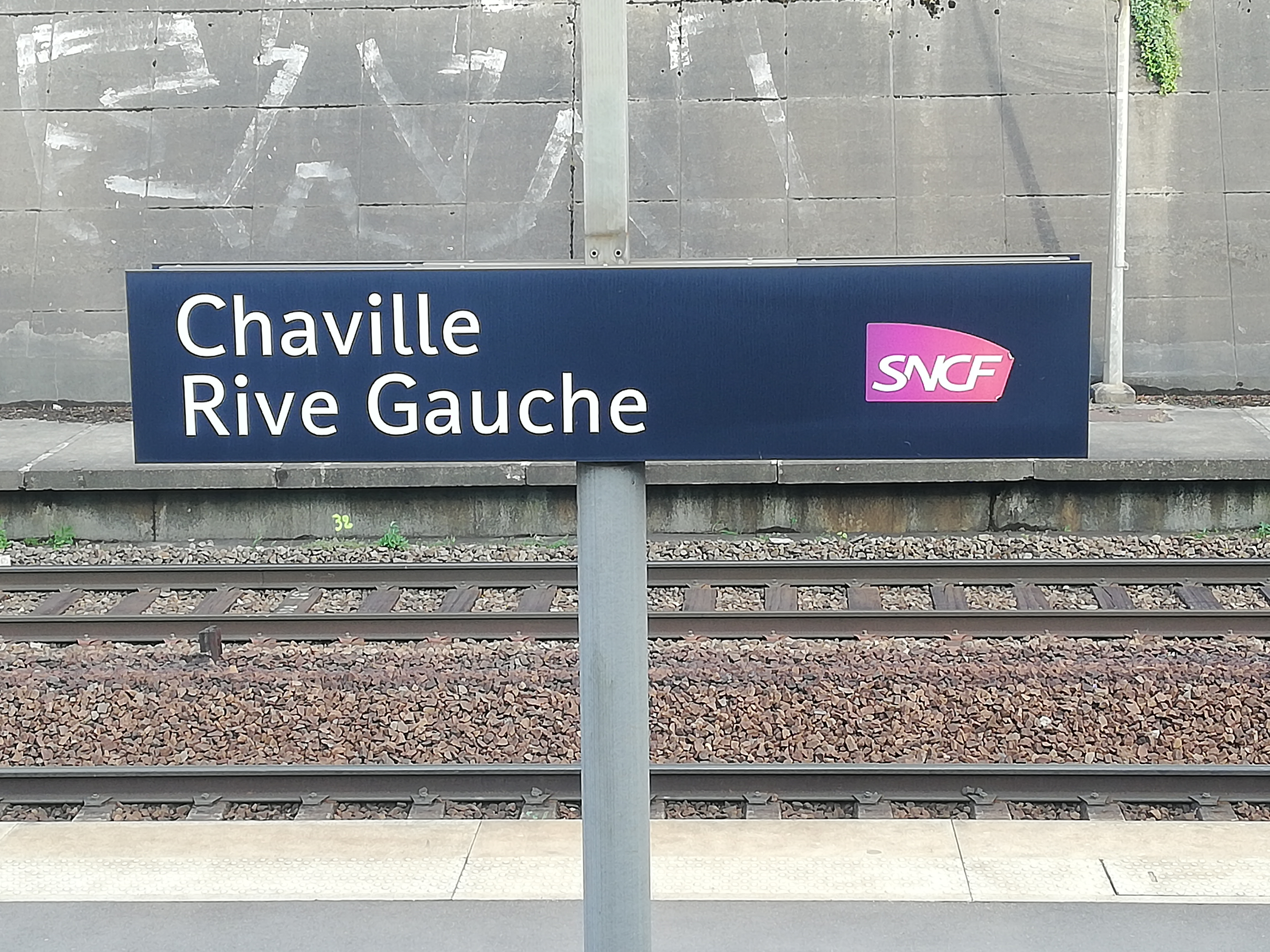 Plaque signalétique de la gare de Chaville - Rive Gauche de la ligne N du Transilien, en 2019.